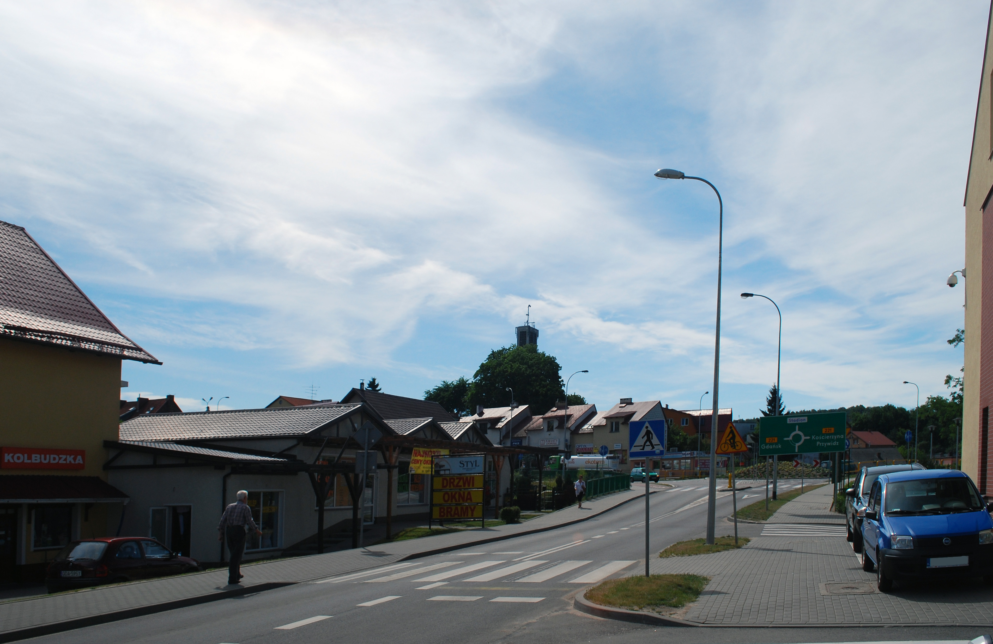 Ul. Przemysłowa w Kolbudach.